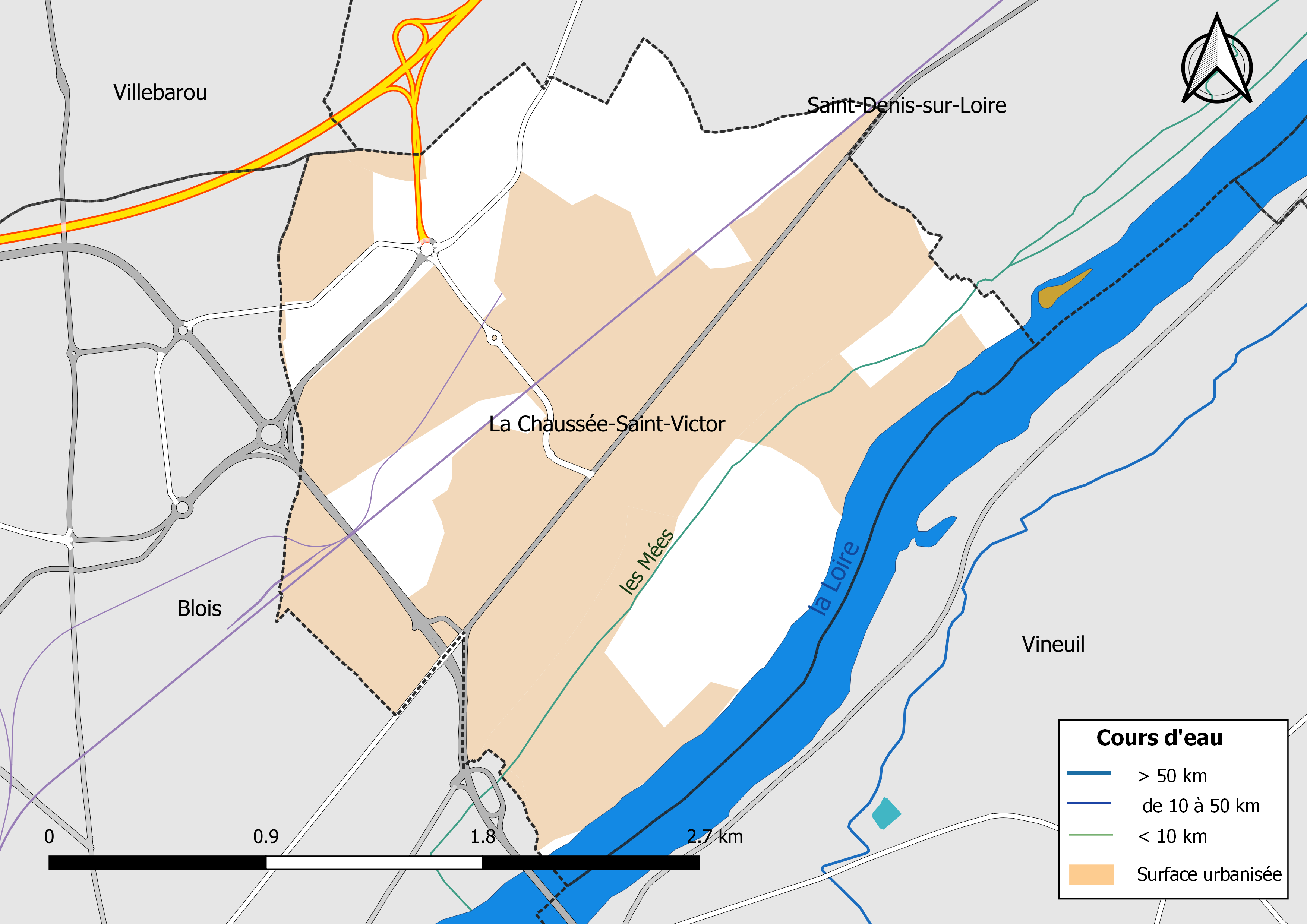 Carte du réseau hydrographique de la commune de La Chaussée-Saint-Victor (Loir-et-Cher, France).